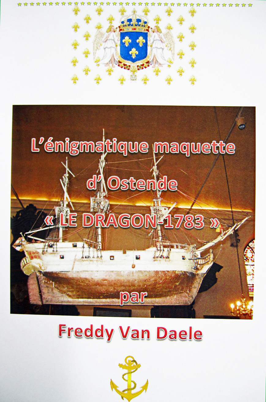 Découverte d'une maquette du Dragon, corvette française d'origine américaine (Washington Brig 1776)